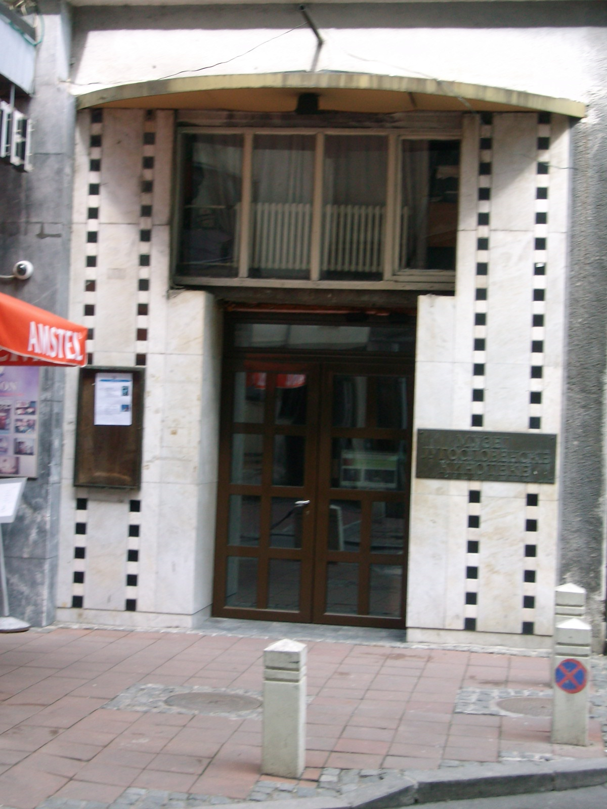 Музеј Југословенске кинотеке